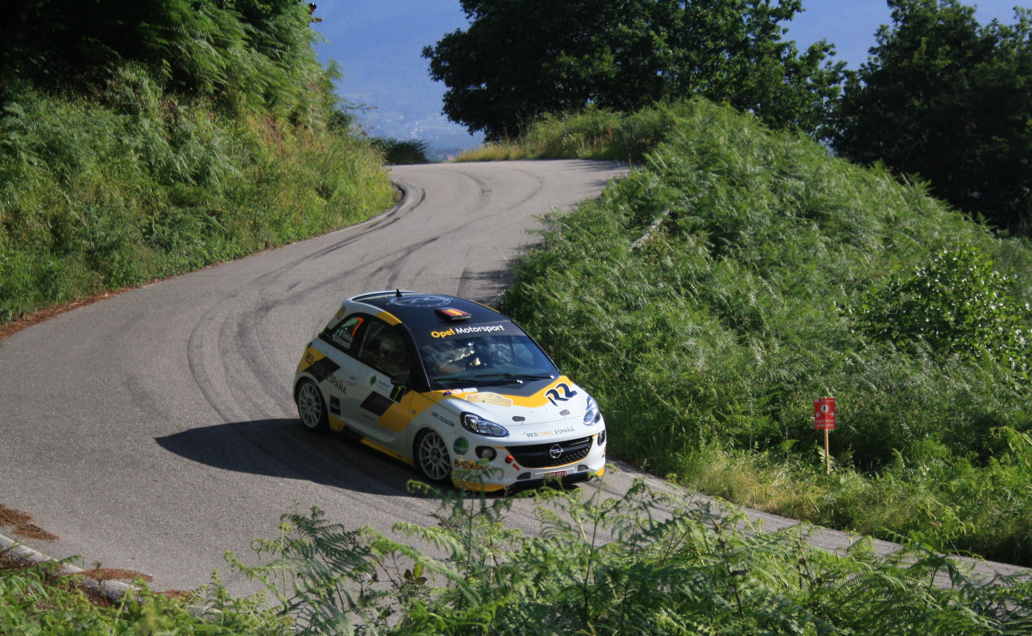 Tramo de Alba- Nigrán, en el Rally Rías Baixas 2014, donde se hace con un septimo puesto, que le hace lograr el liderato del campeonato.